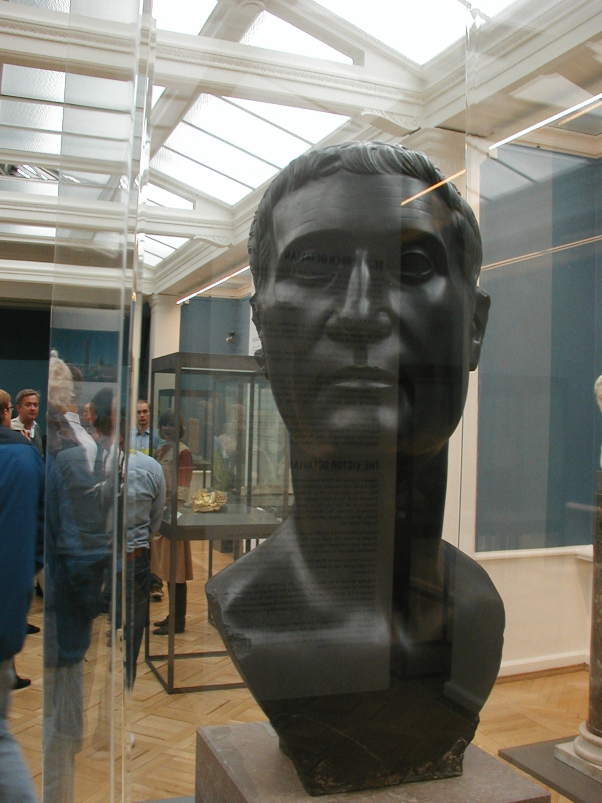 Porträtbüste aus der Zeit der späten römischen Republik, stellt wahrscheinlich Marcus Antonius dar, Ny Carlsberg Glyptothek, Kopenhagen